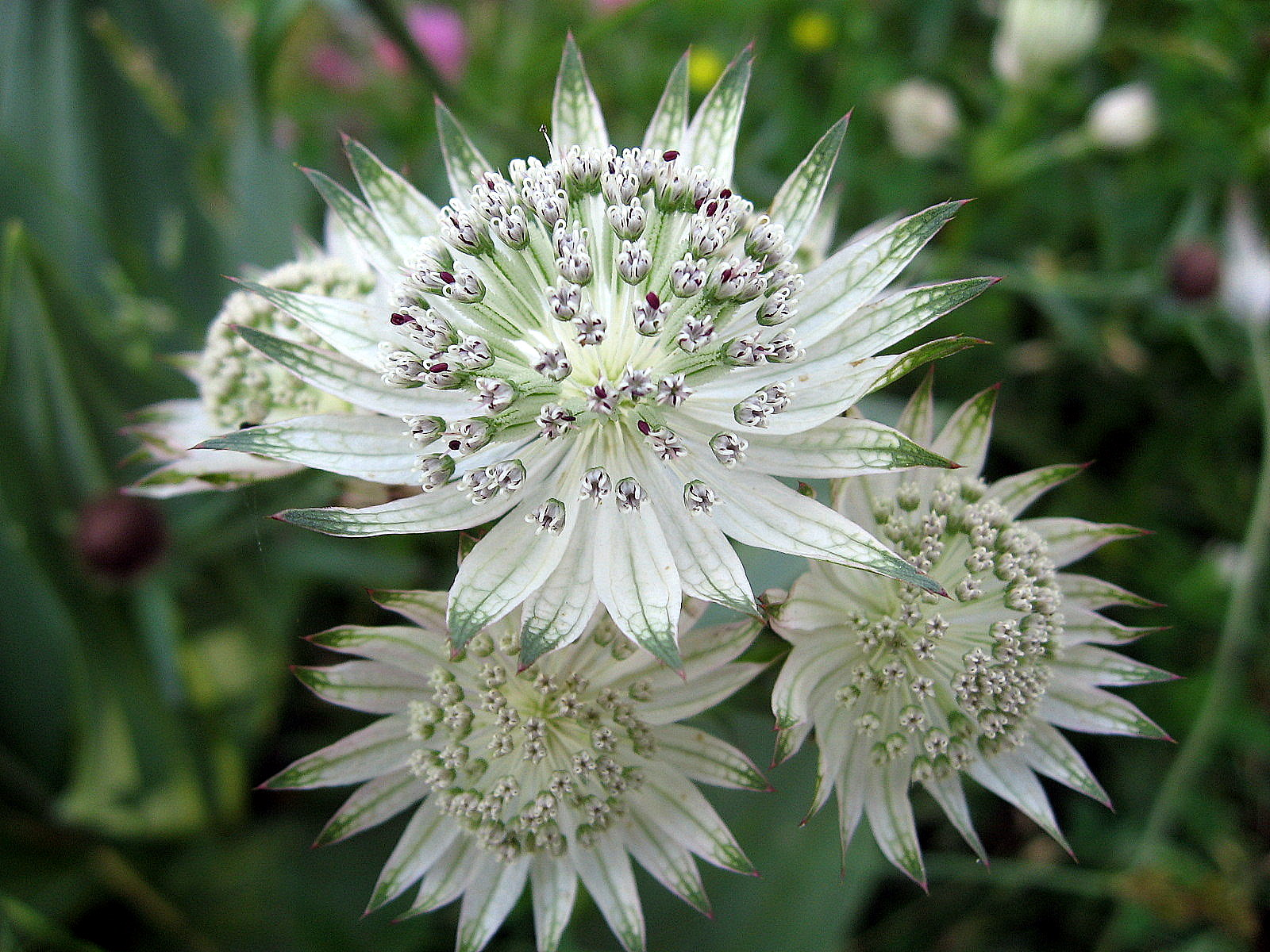 Große Sterndolde (Astrantia major)